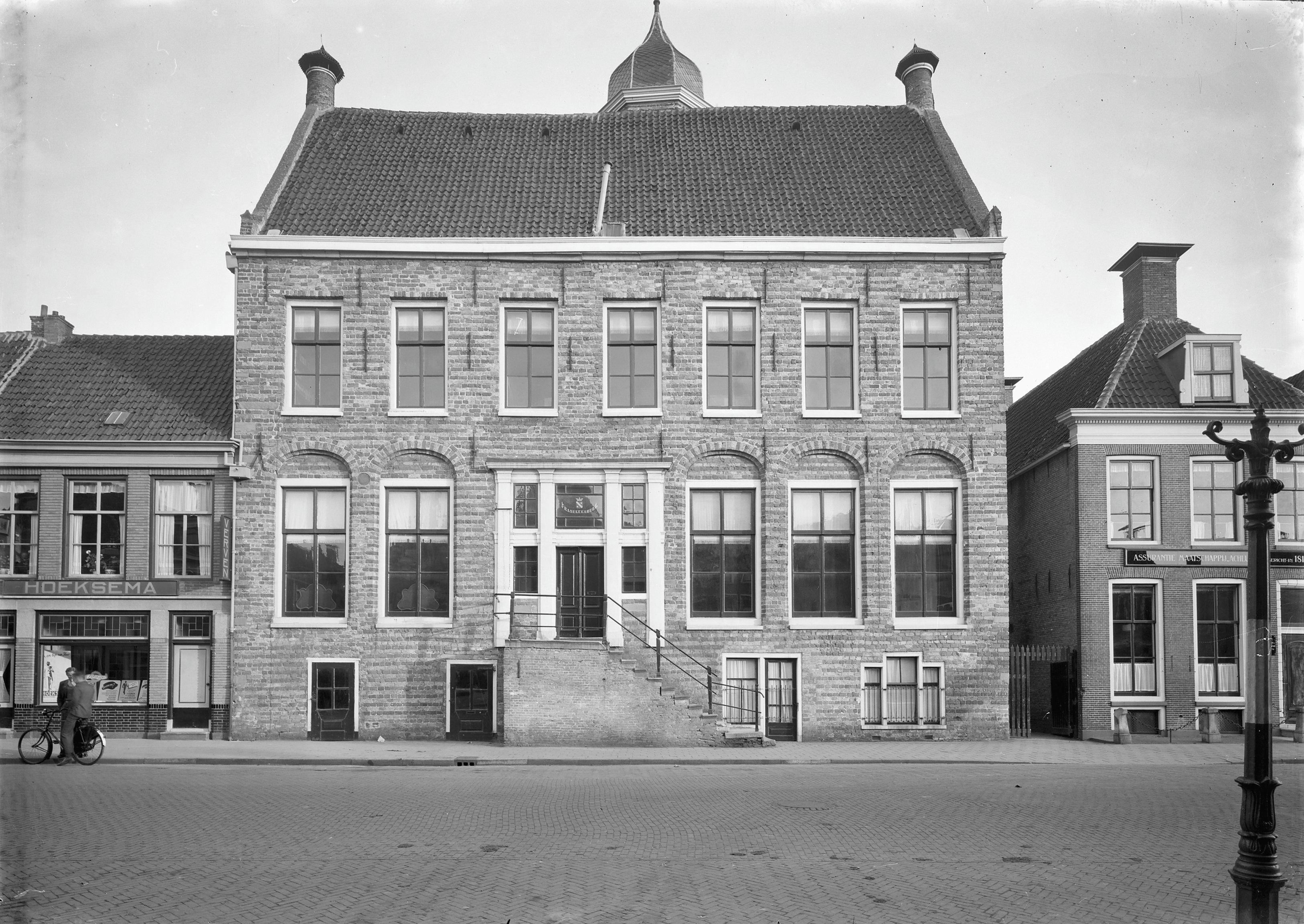 Martenahuis: uitwendig vanuit het noorden en vanuit het zuiden